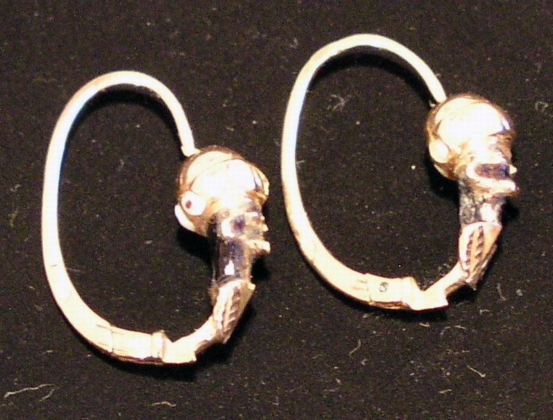 Morčići, nakit, originalni suvenir grada Rijeke, Hrvatska